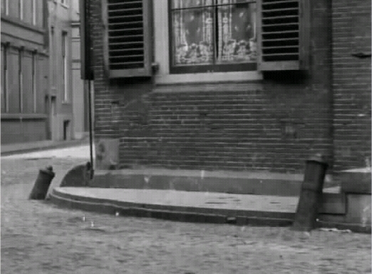 Uitsnede uit een foto van J.A. Moesman. Kanonslopen als schamppaal en nog net zichtbaar een schampsteen in Utrecht, op de hoek van de Keistraat met Achter Sint Pieter voor huis De Krakeling (Utrecht).